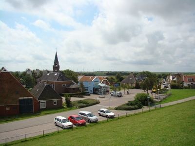 Uitzicht op Zurich vanaf de dijk